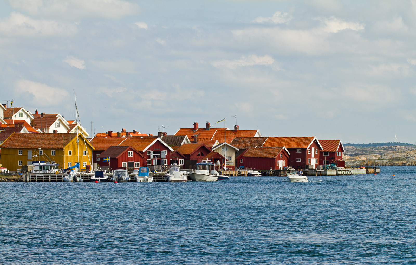 Mollösund, Juli 2010